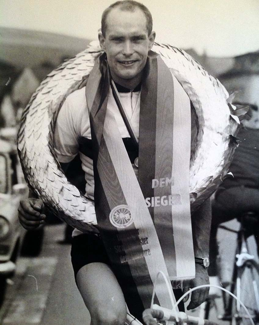 Jürgen Walter, Deutscher Straßenamateur-Meister, Radsportler, 1967